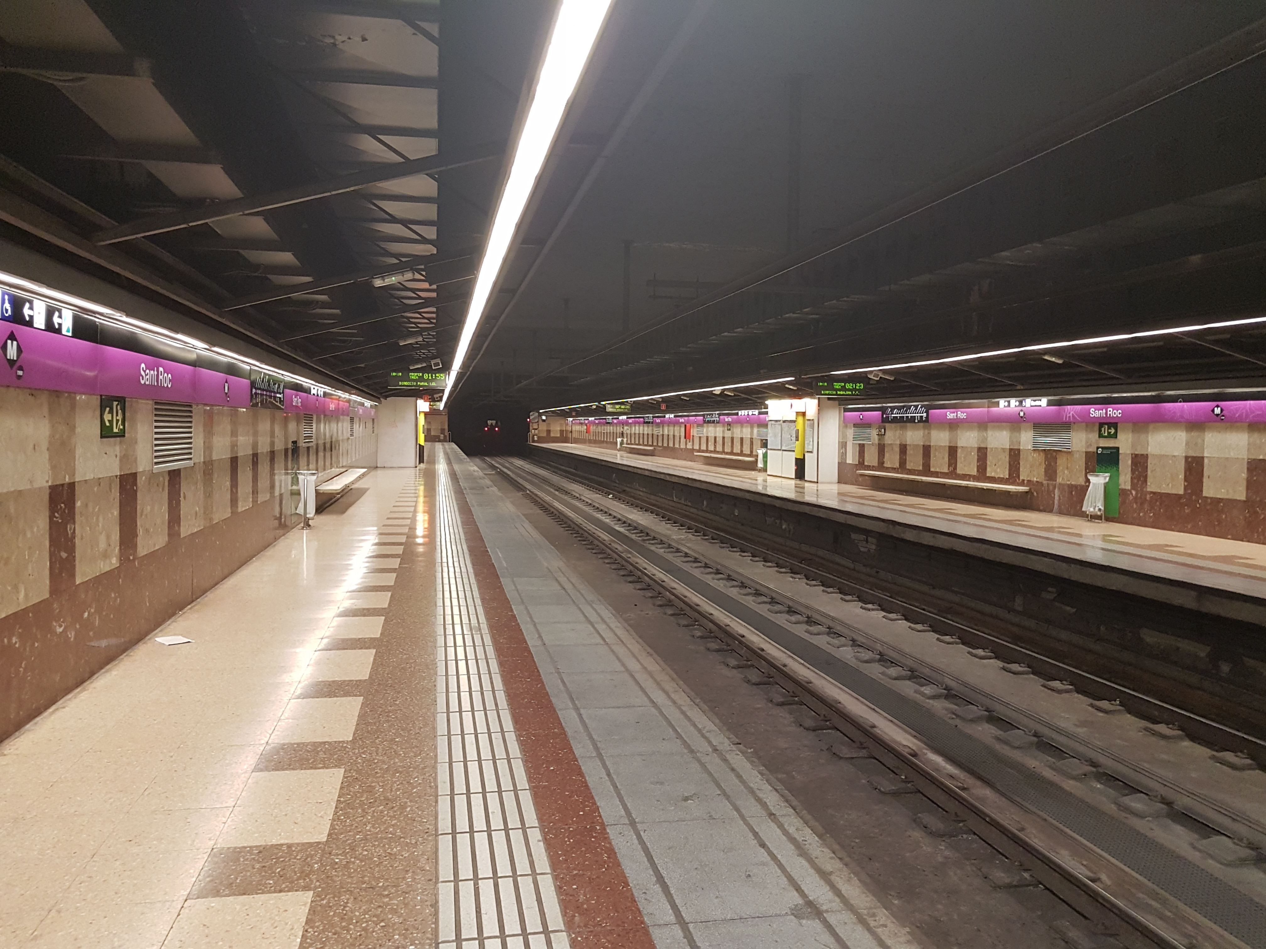 Estació de Sant Roc de la línia 2 del metro de Barcelona